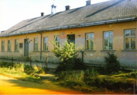 Drugi budynek szkoły w Bączalu.